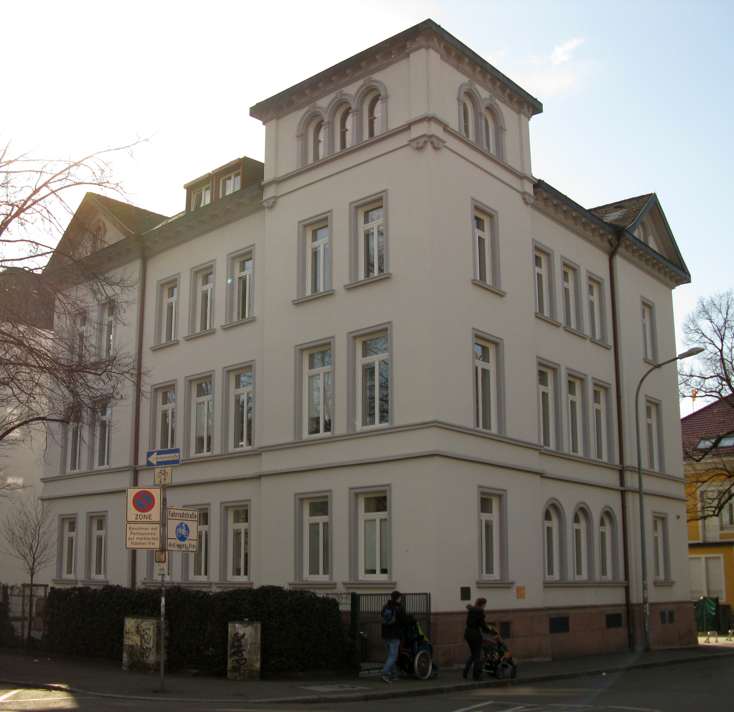 Wallstraße 10 in Freiburg, Verlagssitz von 1890 bis 1895 von Friedrich Ernst Fehsenfeld und Wohnhaus von Marina Zwetajewa (1904-1905)